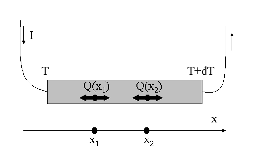 Schéma illustrant le principe de l'effet Thomson. dessin réalisé par Utilisateur:David Berardan Utilisateur:David Berardan